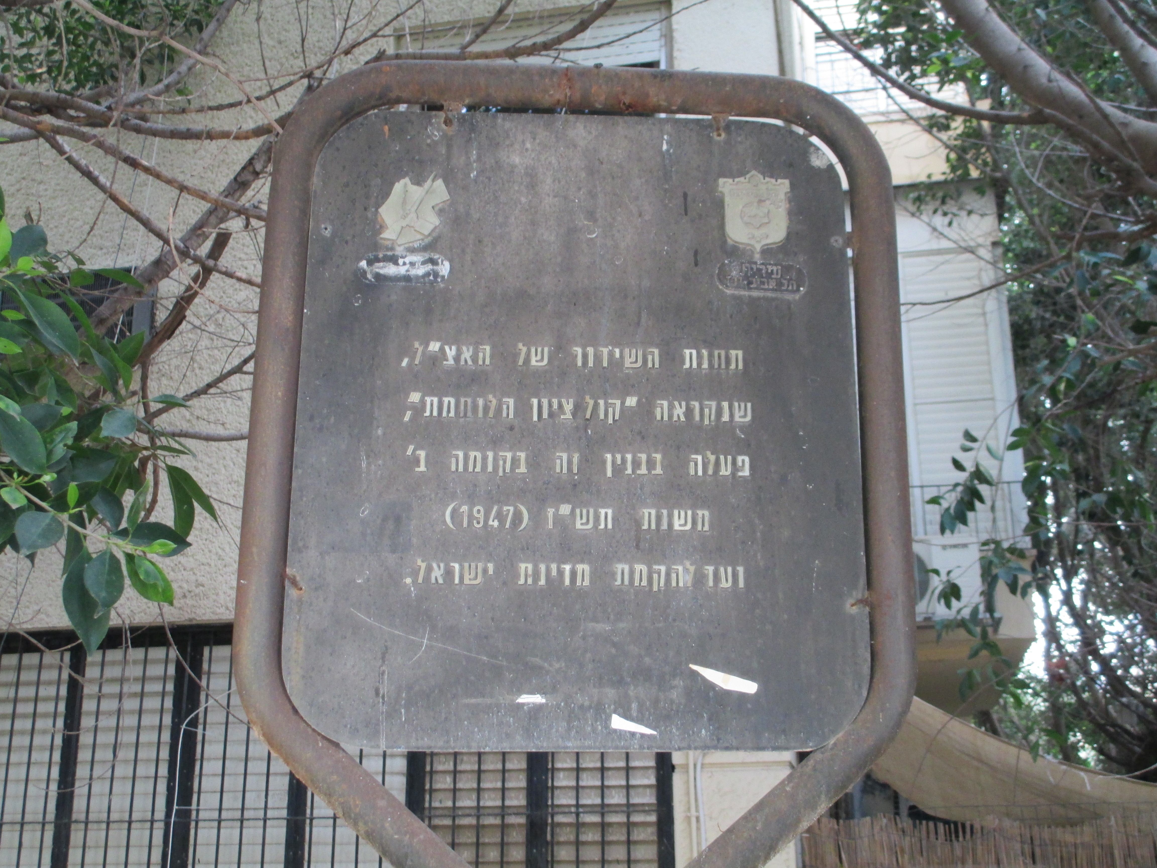 לוחית זיכרון לתחנת השידור של אצ"ל, רח' טשרניחובסקי 39 פינת טרומפלדור